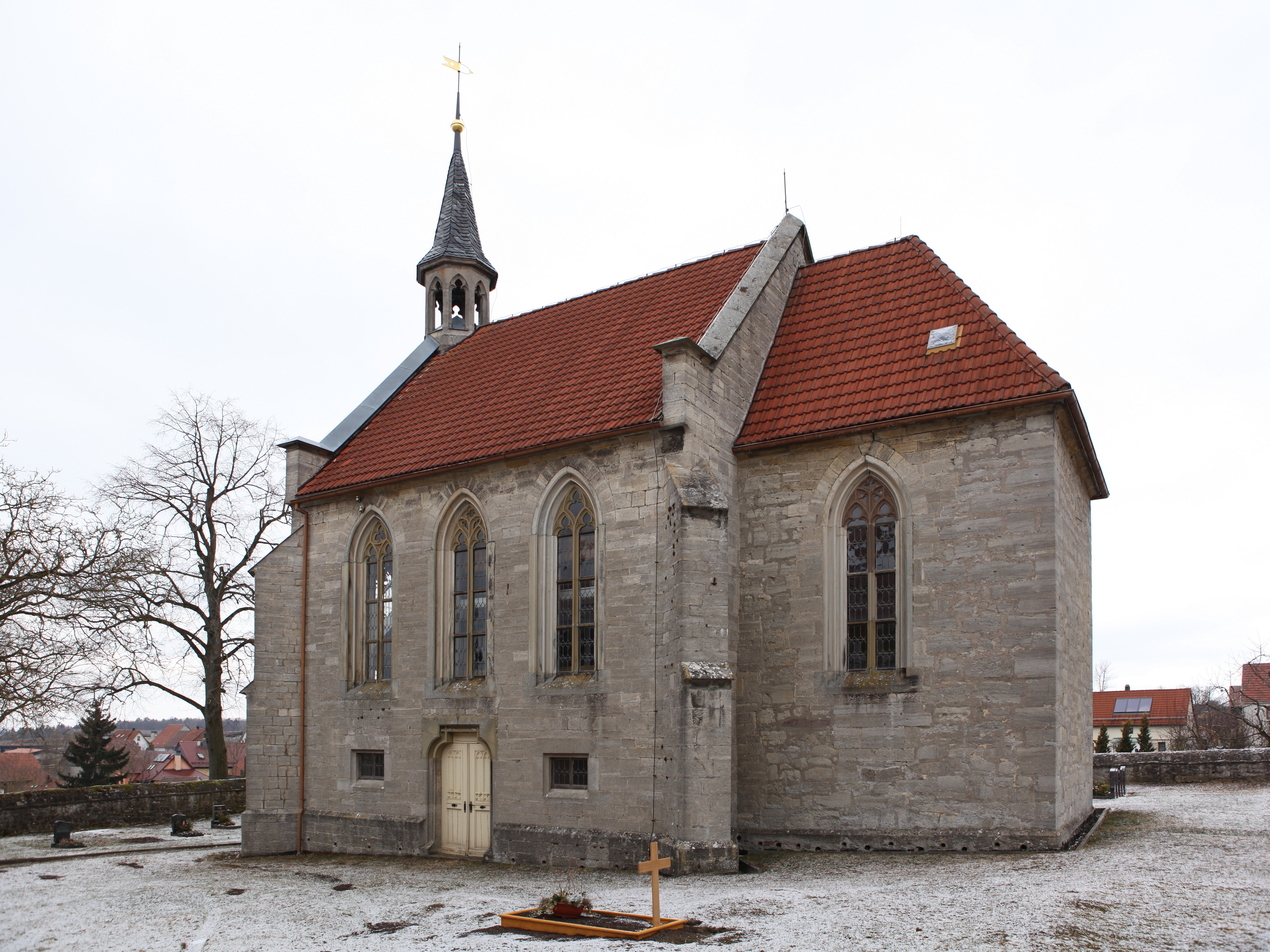 Martinskirche in St. Bernhard, Lk Hildburghausen